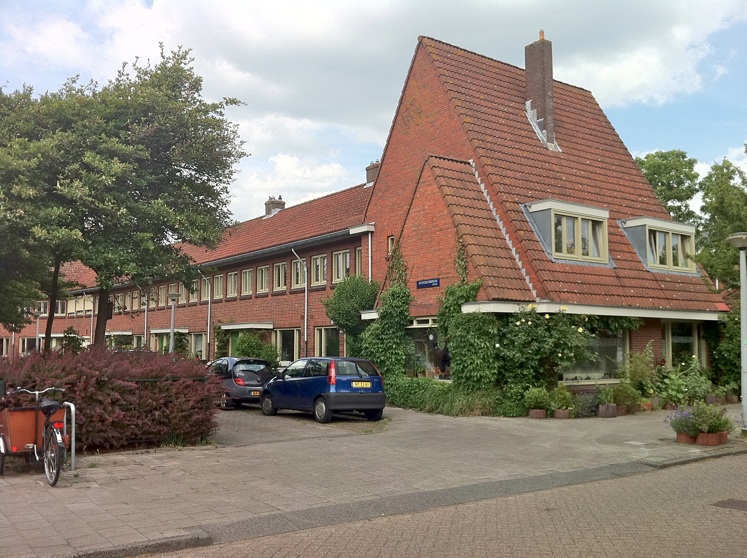 Amsterdam-Noord, Hoek Duindoornplein / Hortensiastraat (Latherusbuurt, onderdeel van Bloemenbuurt). Van Karel J. (Dick) Greiner (1891-1964) is het gedeelte van de Latherusbuurt tussen de Azaleastraat, Latherusstraat, Ribesstraat en Hazelaarstraat, rondom het Duindoornplein (1931). Ontworpen als Tuindorp Buiksloterham. Tegenwoordig eigendom woningcorporatie Ymere voorzover niet verkocht aan zittende huurders of andere particulieren